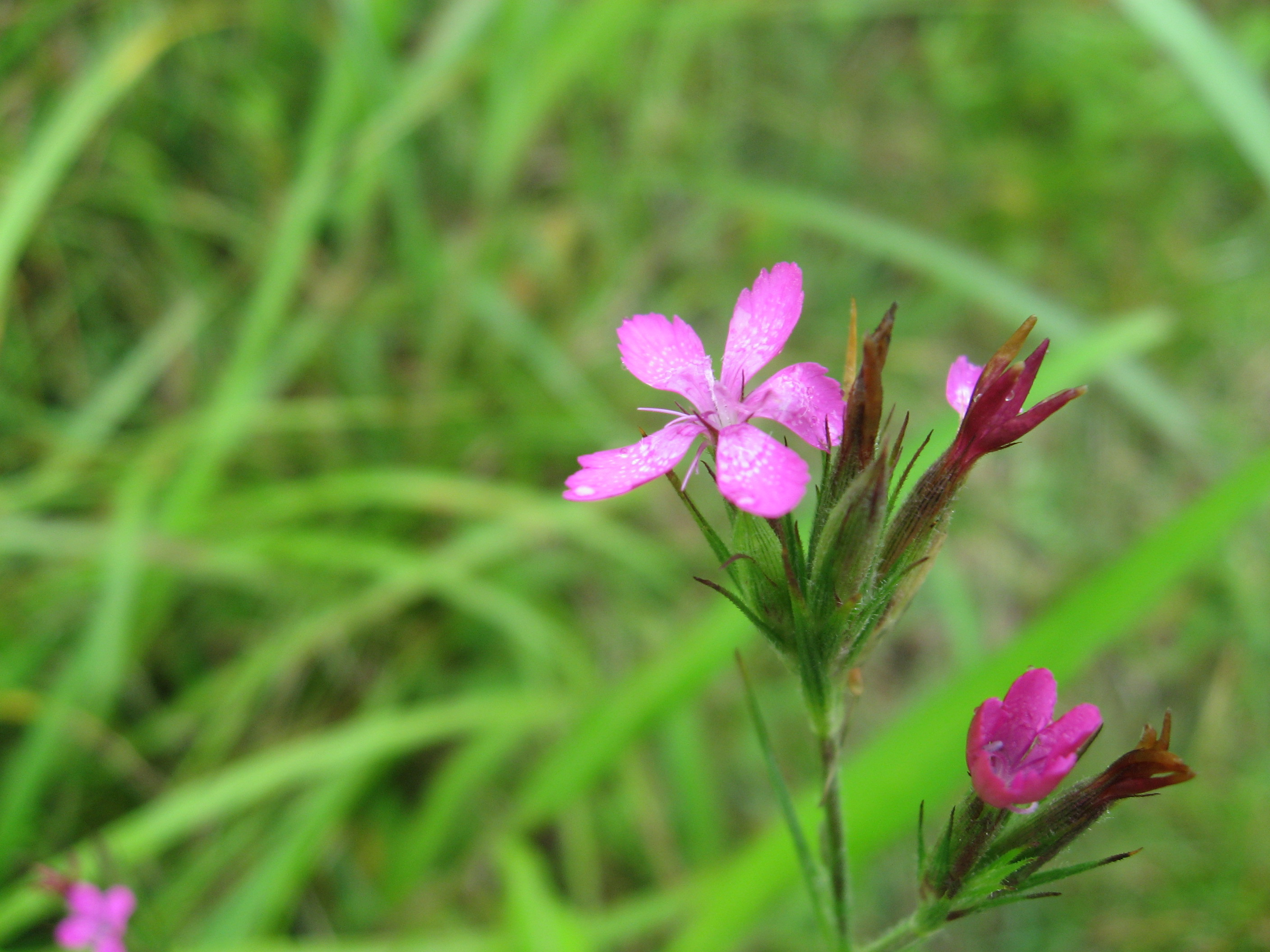 ノハラナデシコ Dianthus armeria